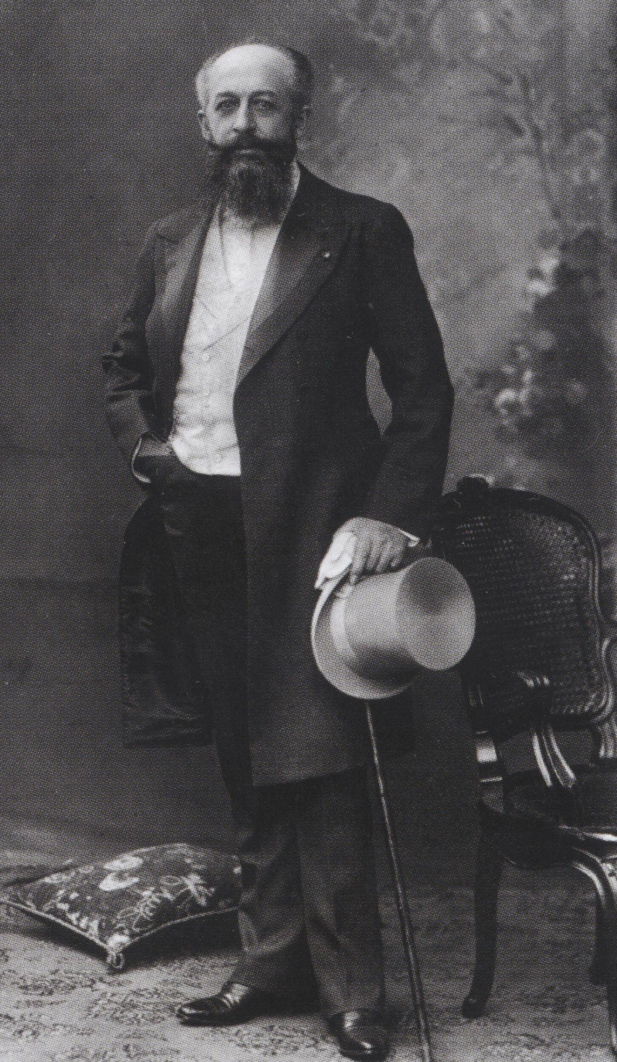 Den Nagelmackers